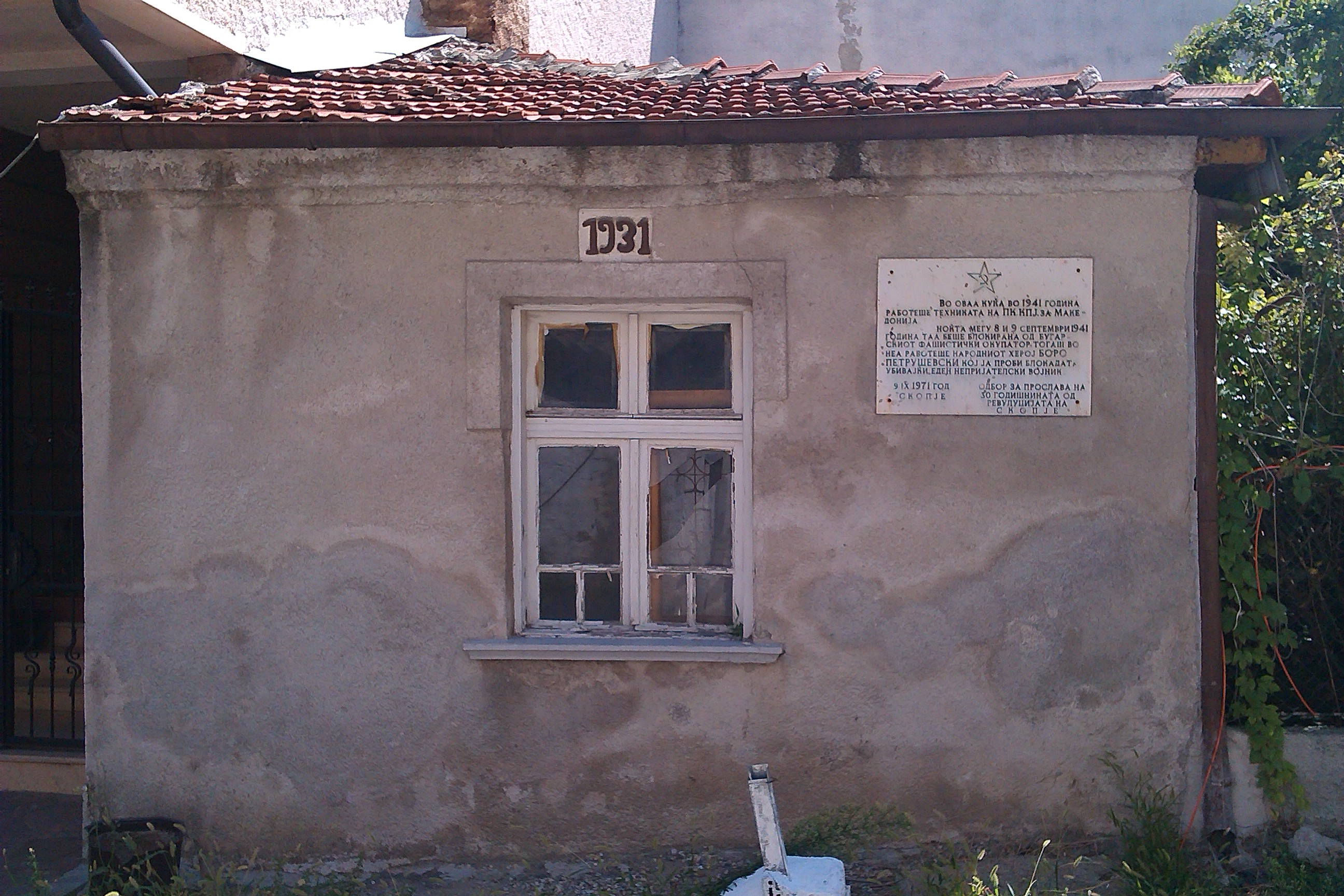 Спомен плоча на местото каде Боро Петрушевски го проби непријателскиот обрач на 8 септемви 1941 година